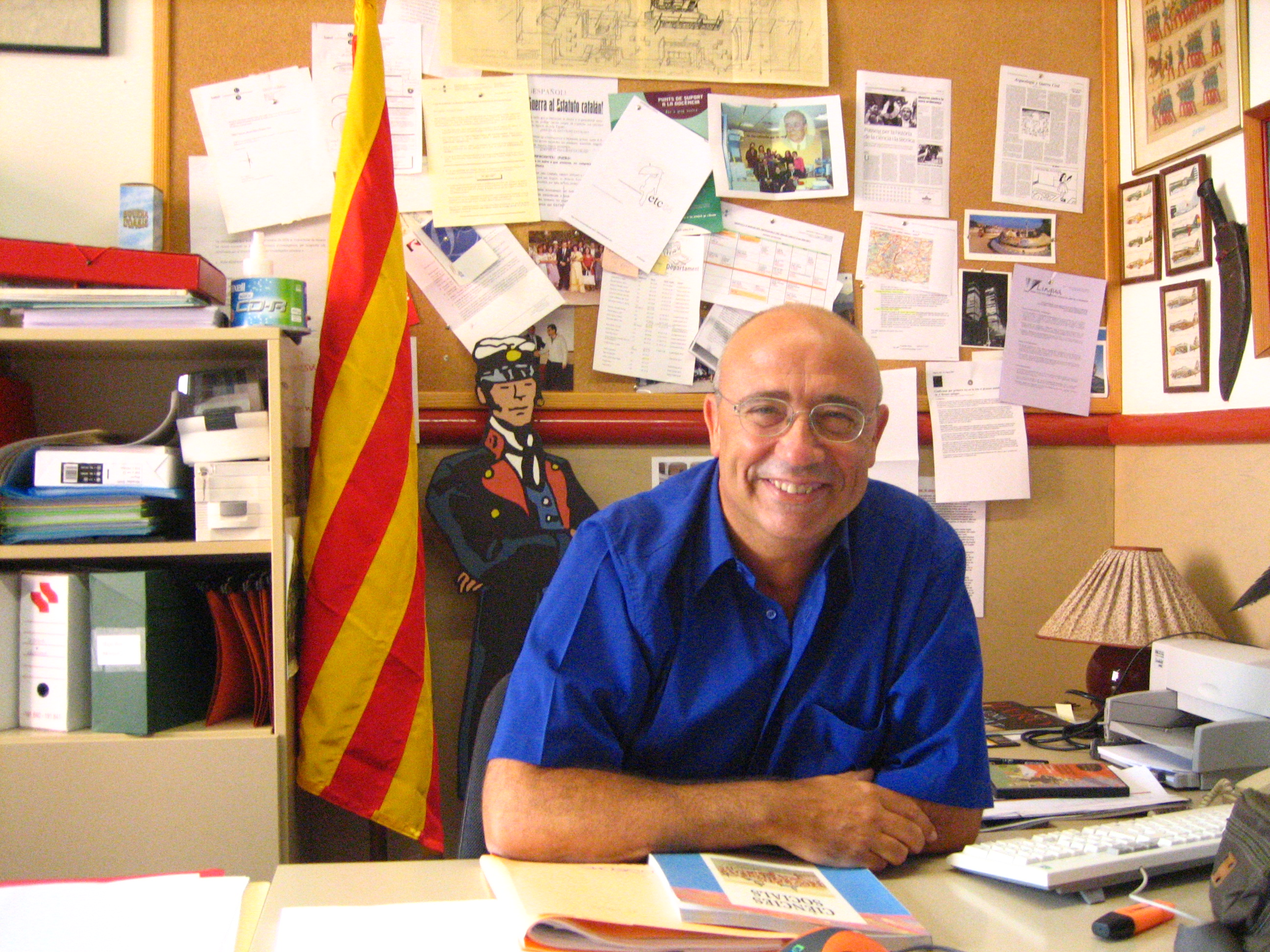 Francesc Xavier Hernàndez (Despatx Universitat de Barcelona)